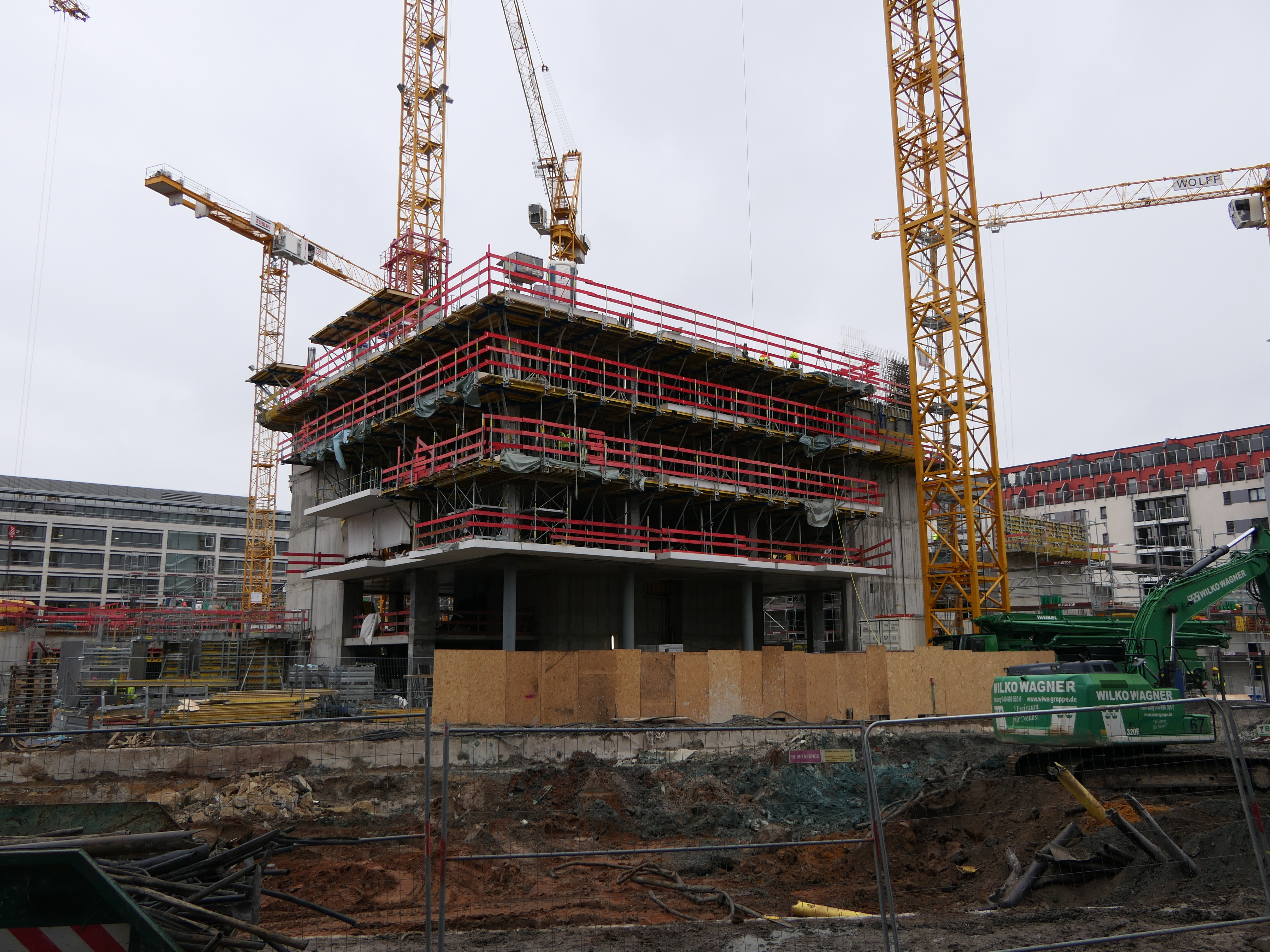 Baufortschritt am Hochhaus "Eden" in Frankfurt im März 2020.